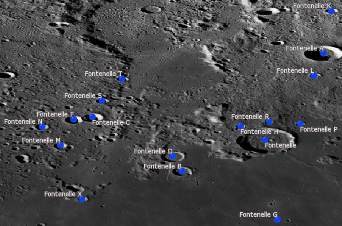 Cráter lunar Fontenelle. Cráteres satélite. (Imagen LROC)